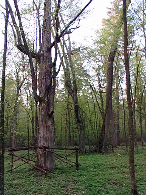 Grab w Szczekotowie